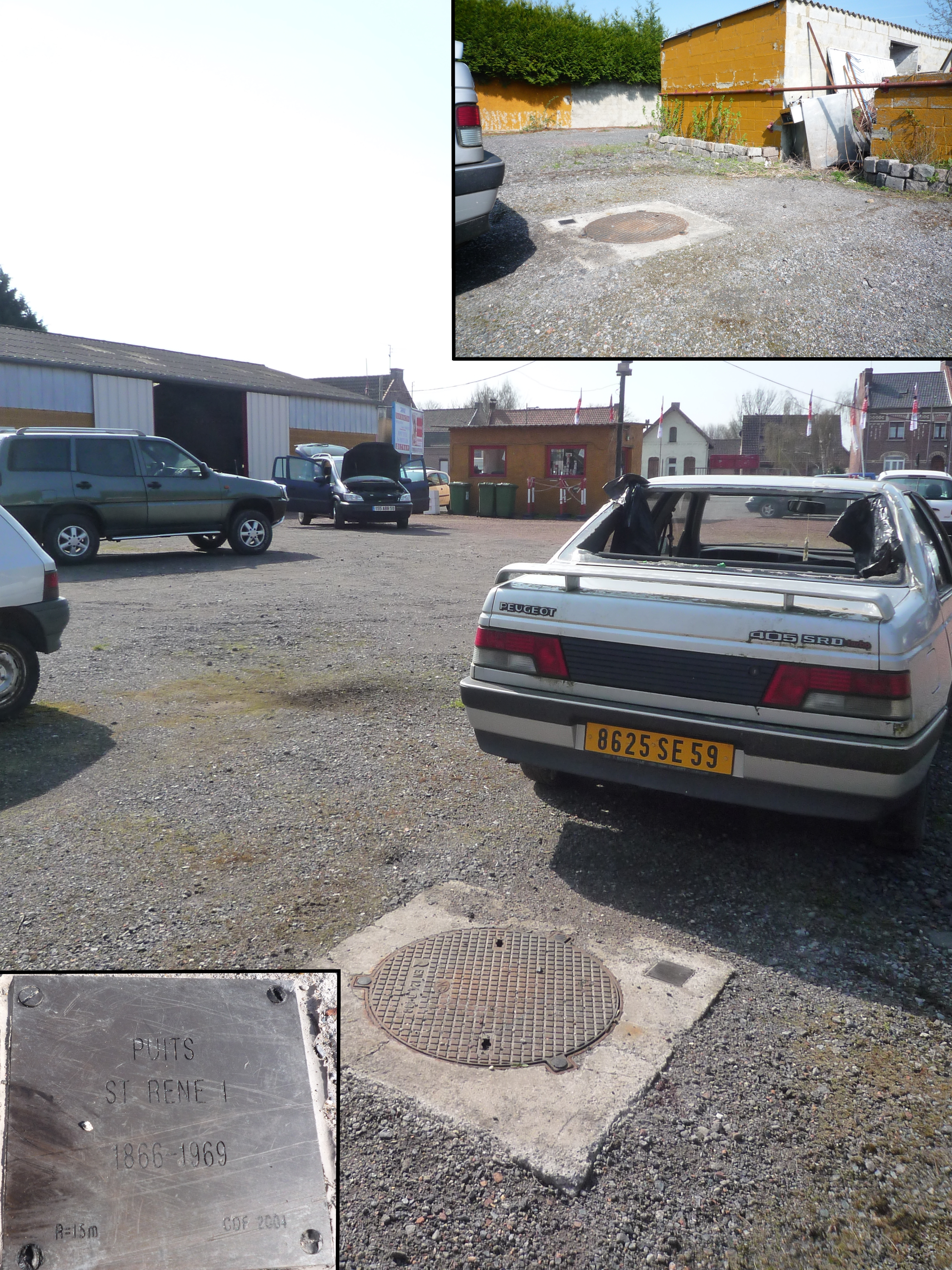 La Fosse Saint René de la Compagnie des mines d'Aniche était un charbonnage constitué de deux puits situé à Guesnain, Nord, Nord-Pas-de-Calais, France.